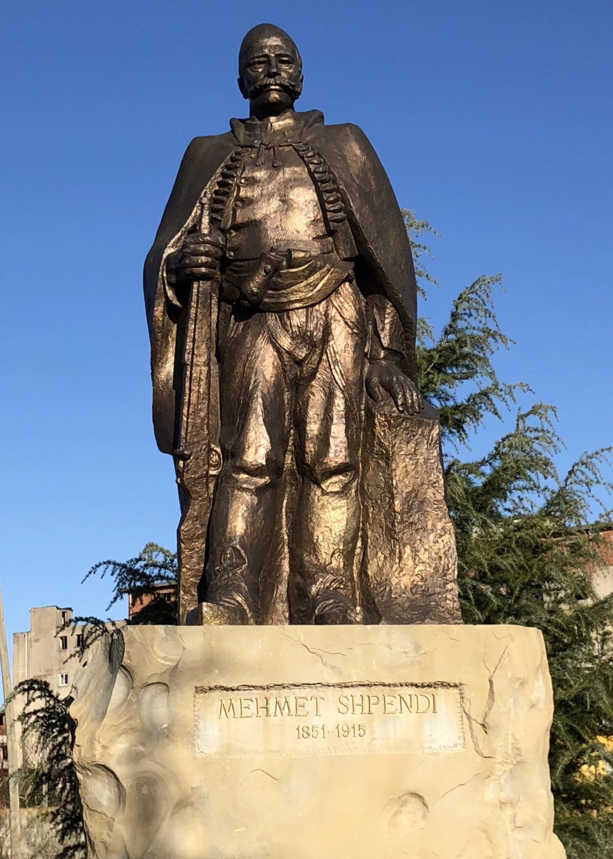 Mehmet Shpëndi